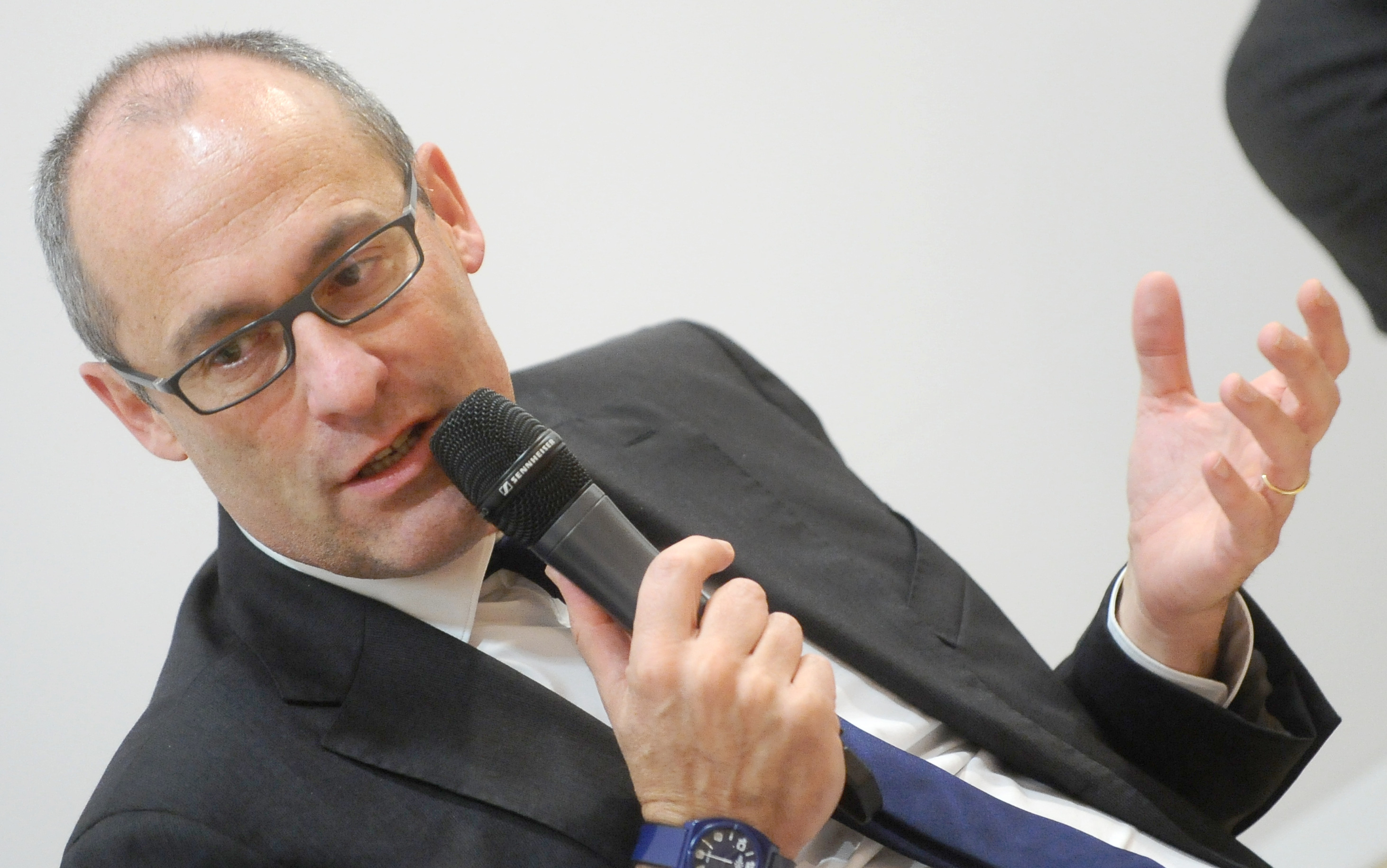 Il presidente della provincia autonoma di Trento Ugo Rossi all'evento organizzato al MuSe per i 10 anni del Corriere del Trentino.